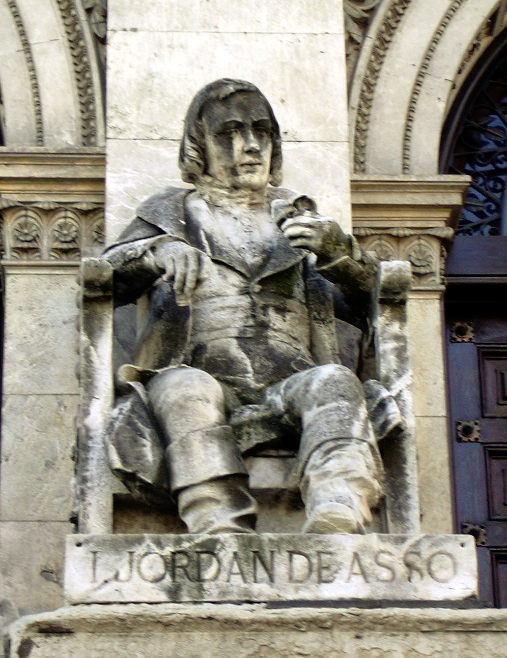 Zaragoza - Antigua Facultad de Medicina - Jordán de Asso - Autor: Dionisio Lasuén